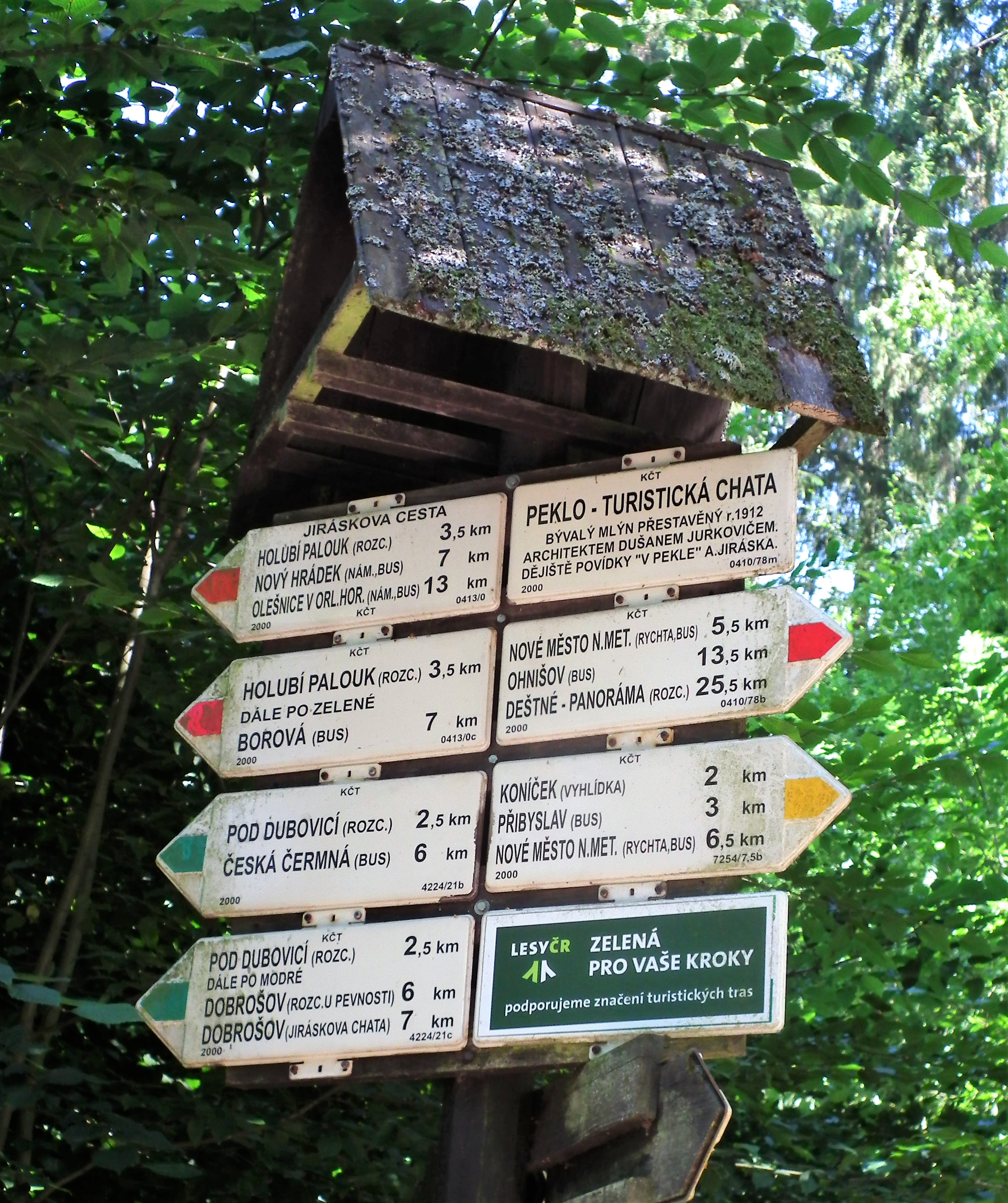 Rozcestownik w Piekle.